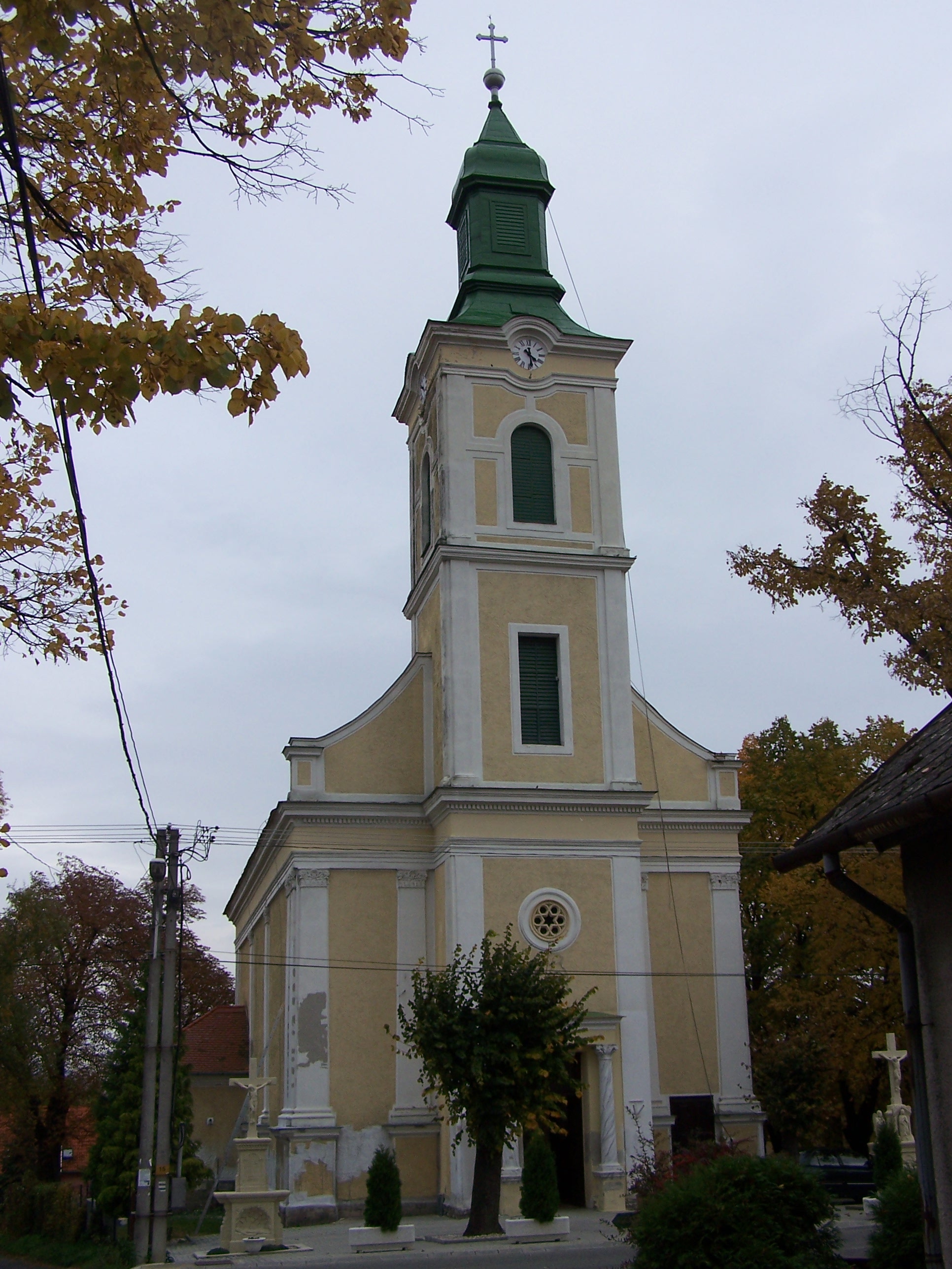 Keresztelő Szent János R. k. templom (Balatonederics, Kossuth u.) This is a photo of a monument in Hungary, Identifier: 9685